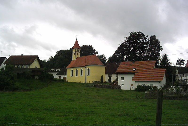 Kapelle im Teilort Eichenberg, 88450 Berkheim, Deutschland